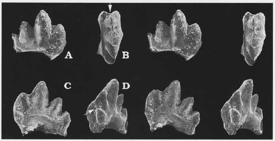 Gobiconodon hoburensis (Trofimov, 1978). Khoboor Beds, Khoboor, Gobi Desert, Mongolia. Crown of right m5 in buccal (A), occlusal( B), lingual (C)' and mesiolingual (D) views.